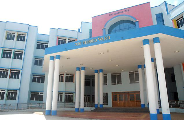 great